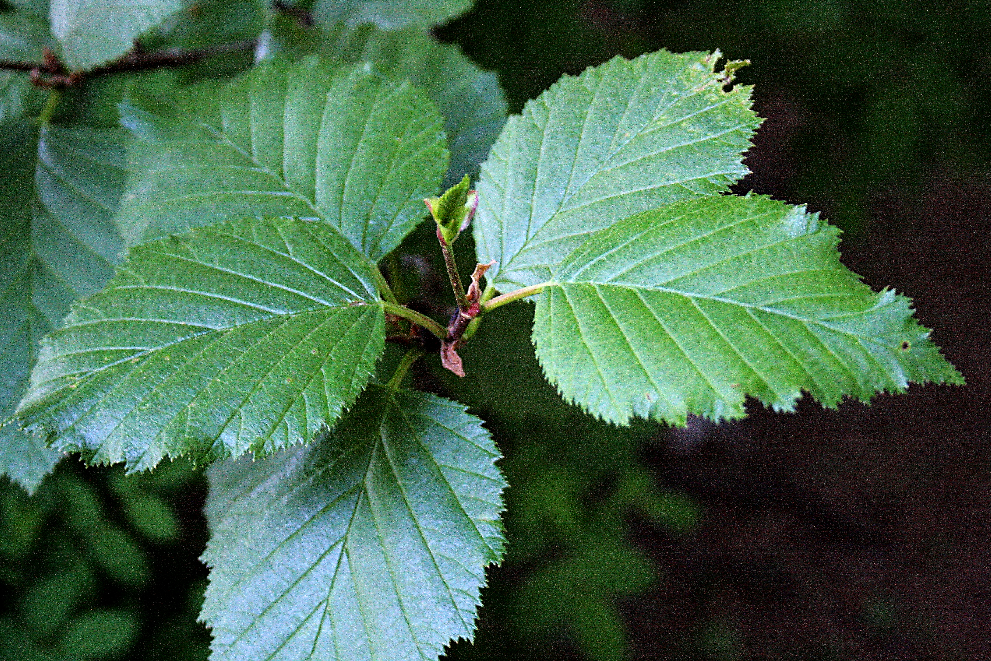 Ísland, Akureyri Botanical Gardens: Grünerle_(Alnus_sinuata)